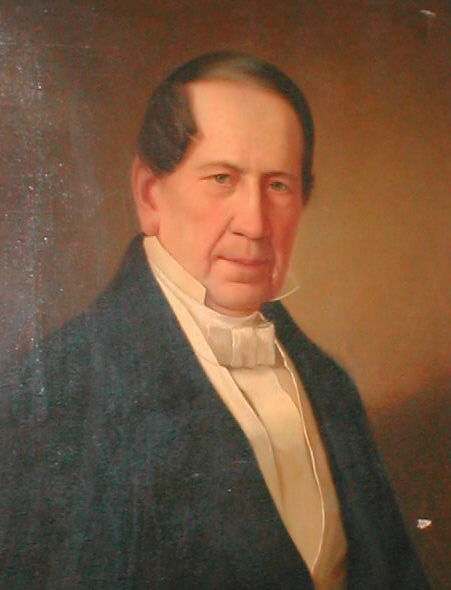 Lars Montén, född Olofsson (1785-1872), grosshandlare, såpfabrikör, stearinljusfabrikör, kommunalpolitiker, Stockholm.